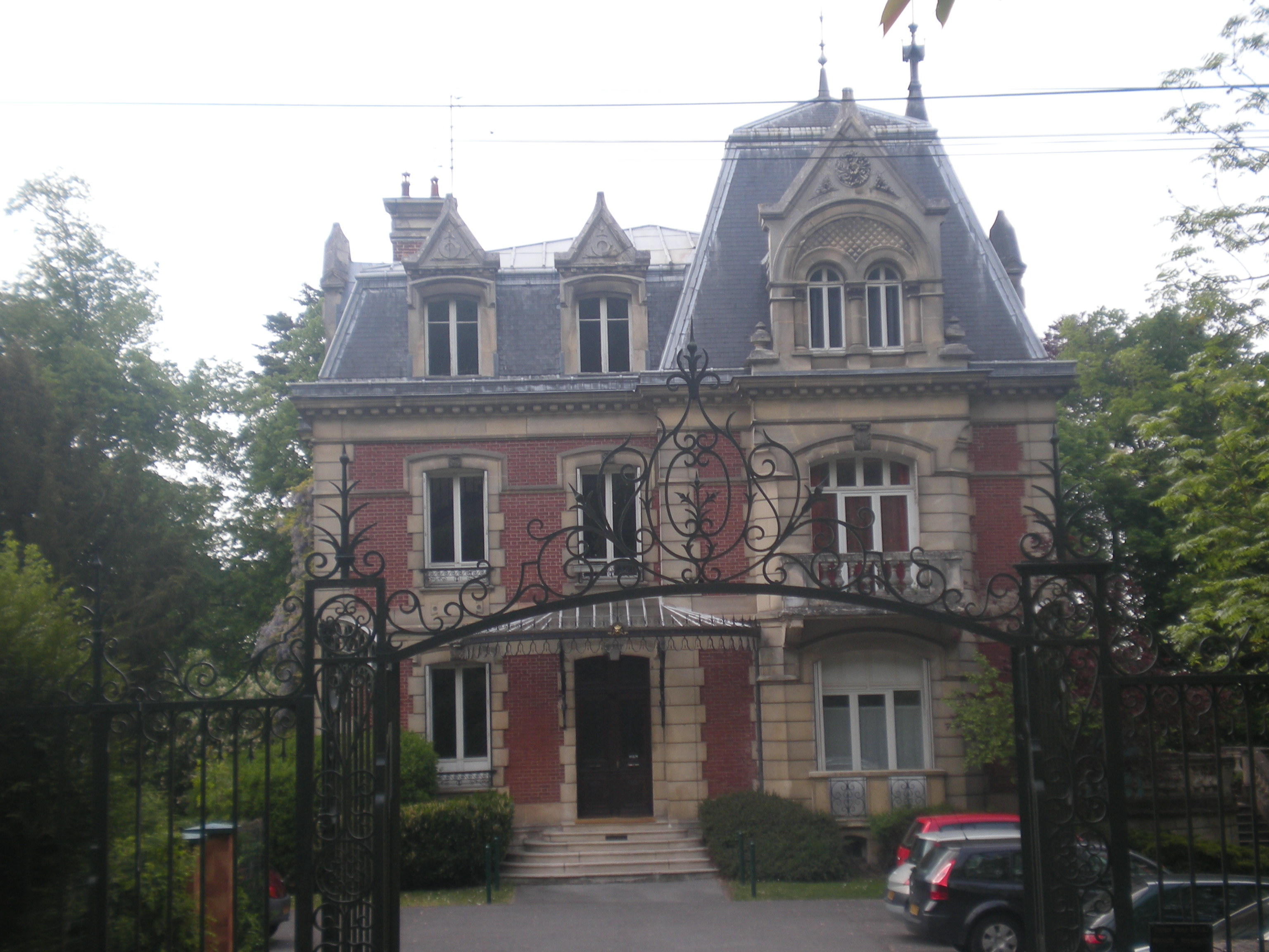 La villa Boudier, rue du Général Pershing